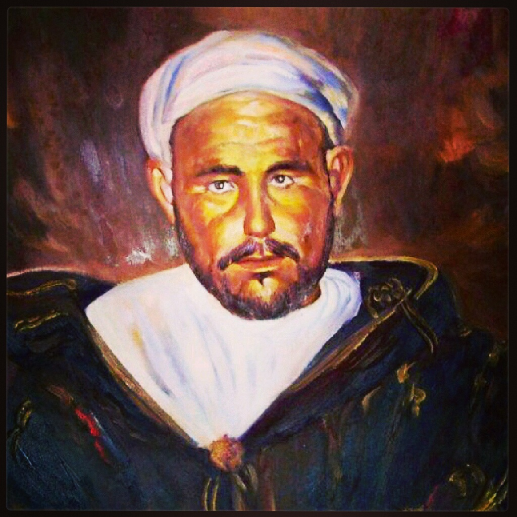 Presidente de la Republica del Rif 1921 - 1927